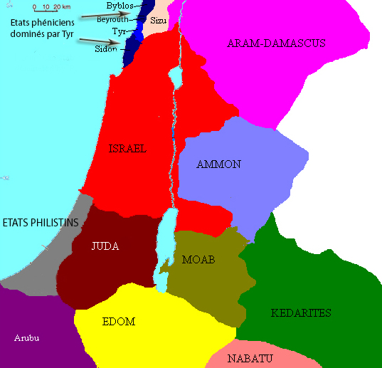 Etats du levant vers -800 avant JC